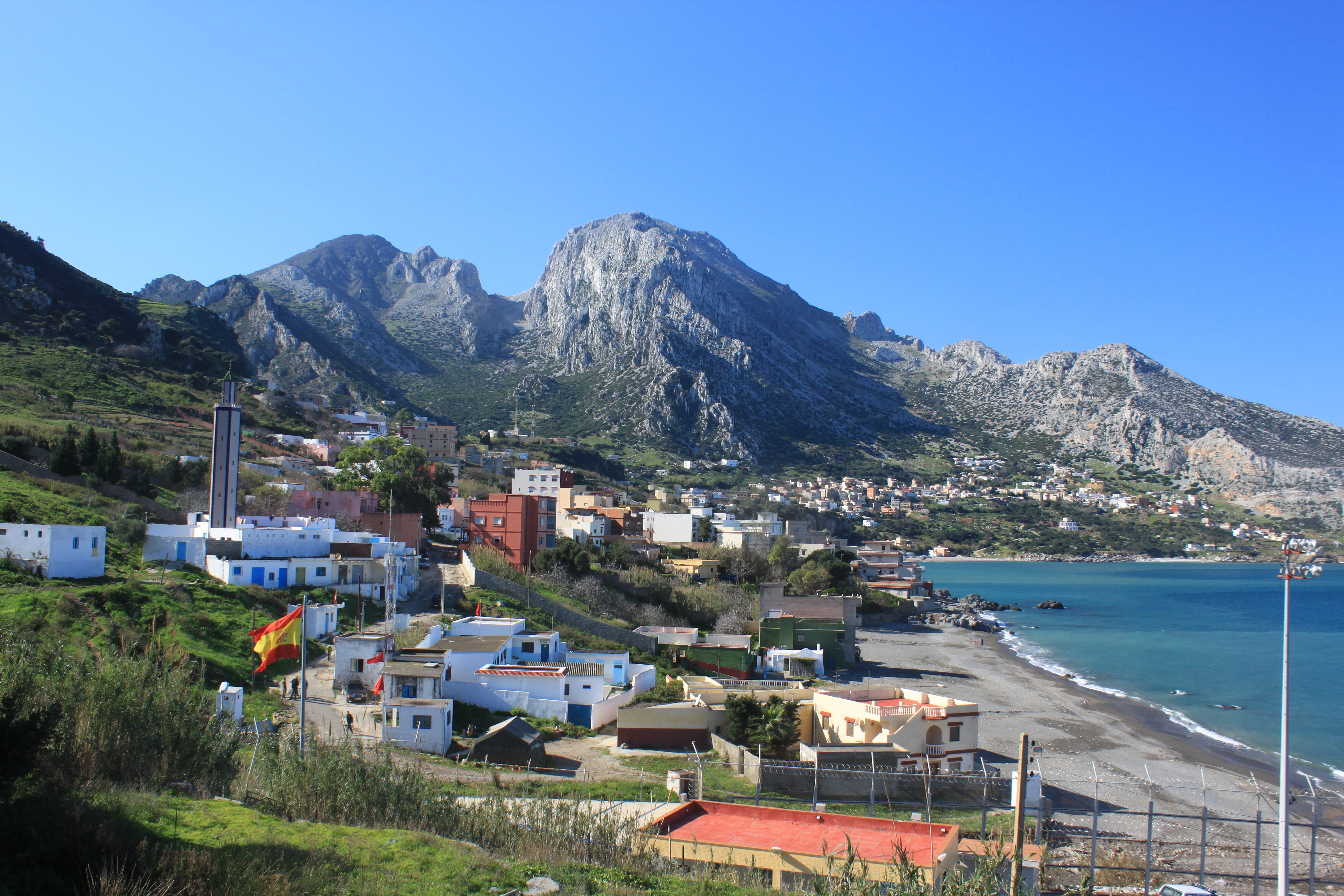 jebel musa from benzu. Puesto fronterizo hispano-marroquí en Benzu (Ceuta)